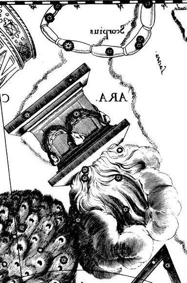 Ara constellation